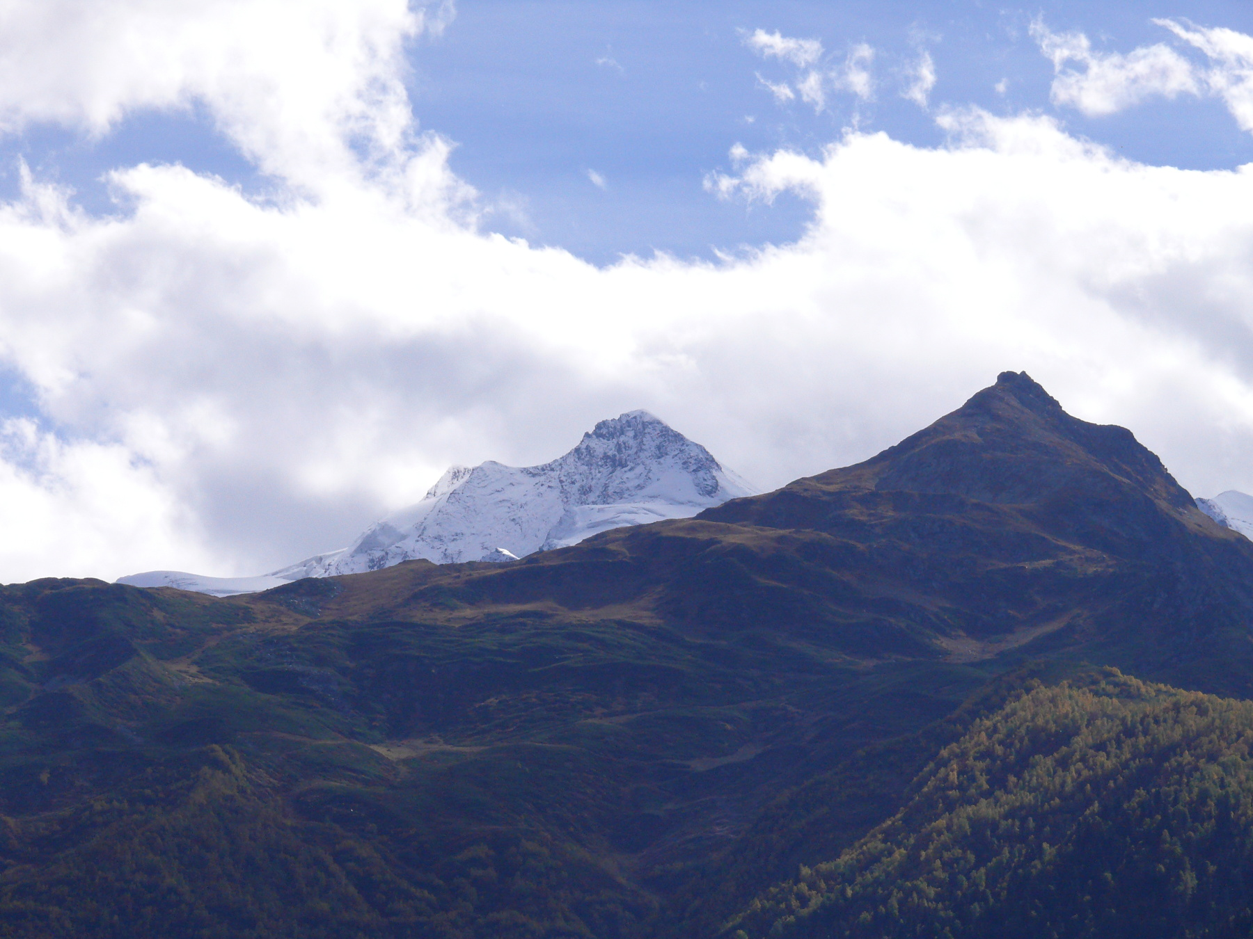 Vrchol Lahili od údolí řeky Dolra